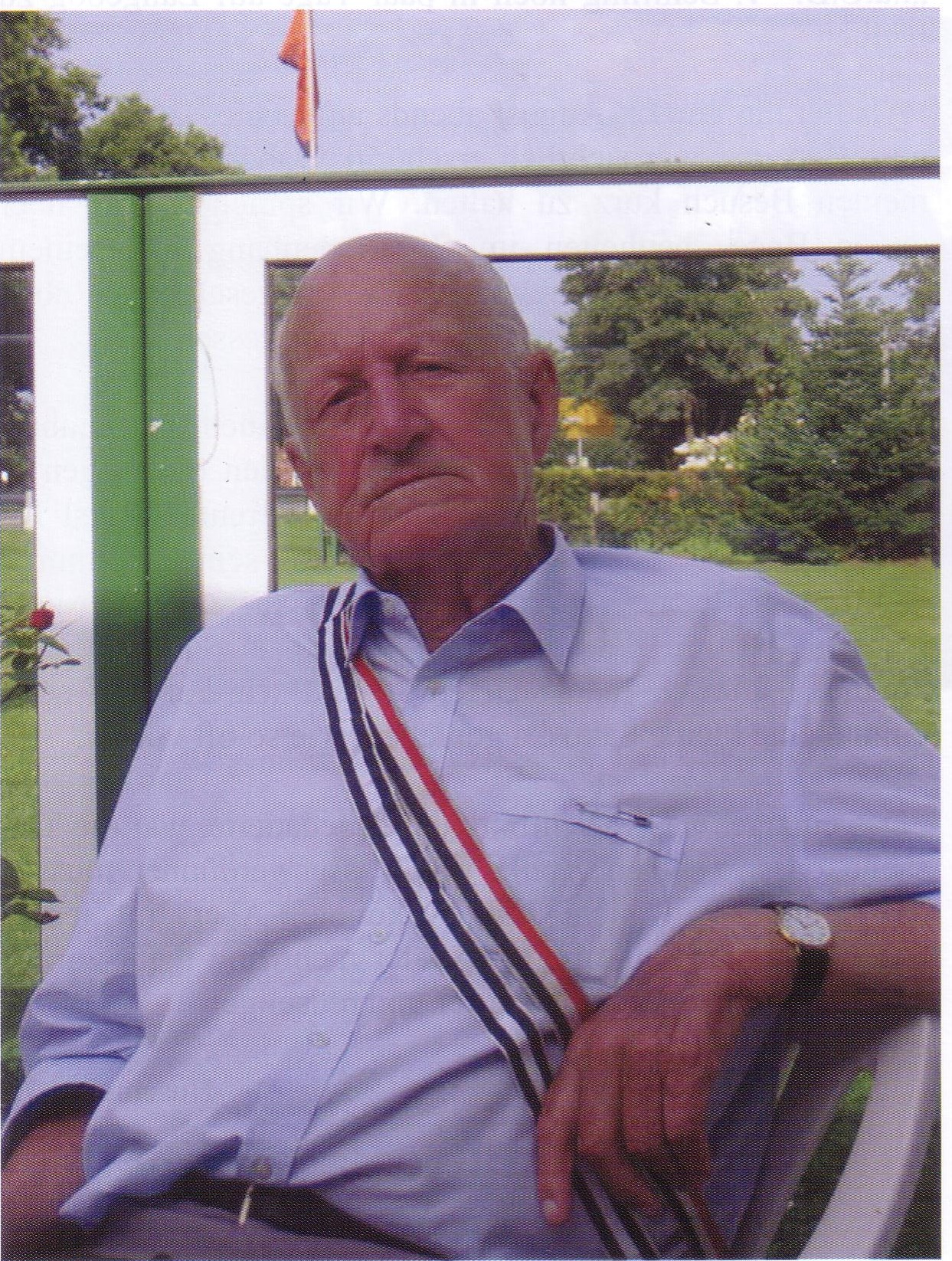 Fotografie von Jürgen Baron von Schilling (1909-2008)